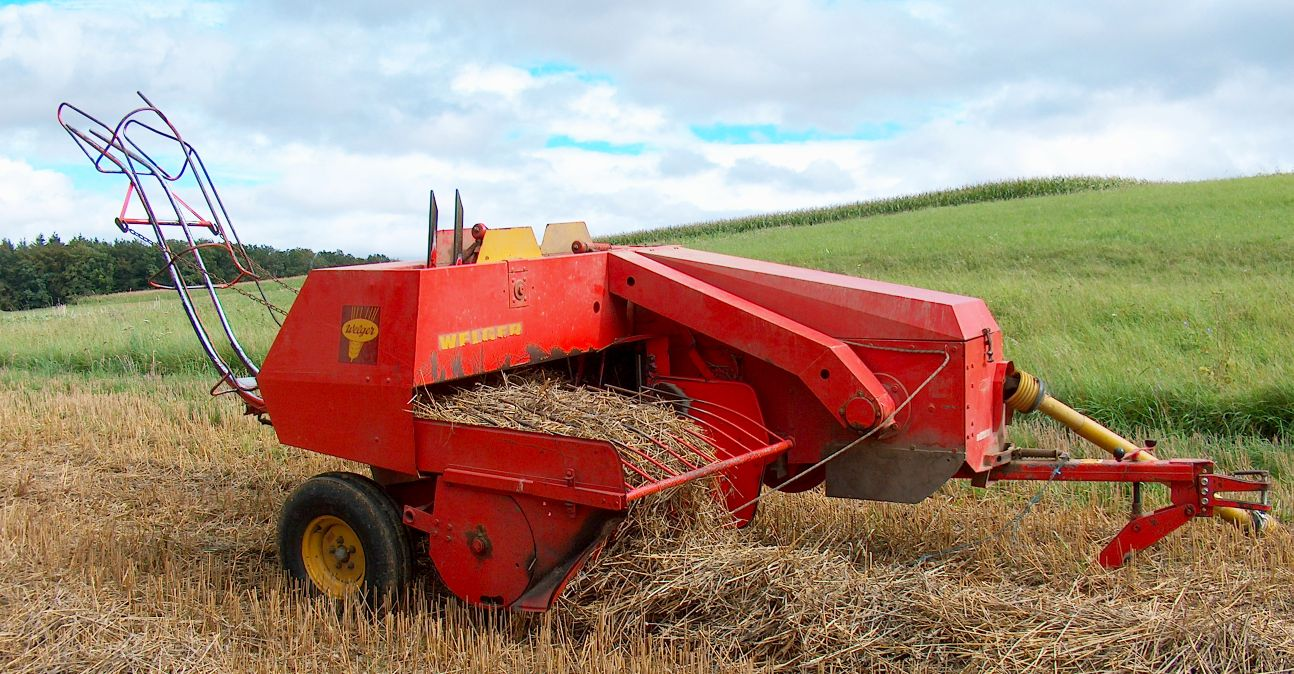 Welger ballepresse